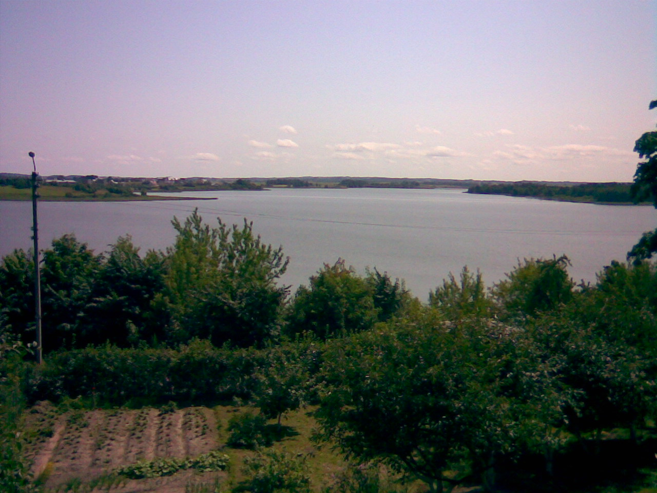 Žemaitėška: Mastė ežers pri Telšiu